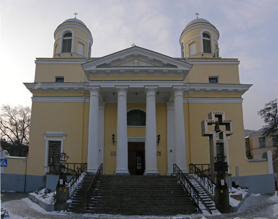 Костьол Святого Олександра: Костьол Святого Олександра, вигляд із входу